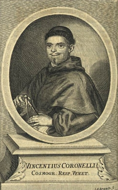 Der venezianische Kartograph und Gelehrte Vincenzo Maria Coronelli (1650-1718)